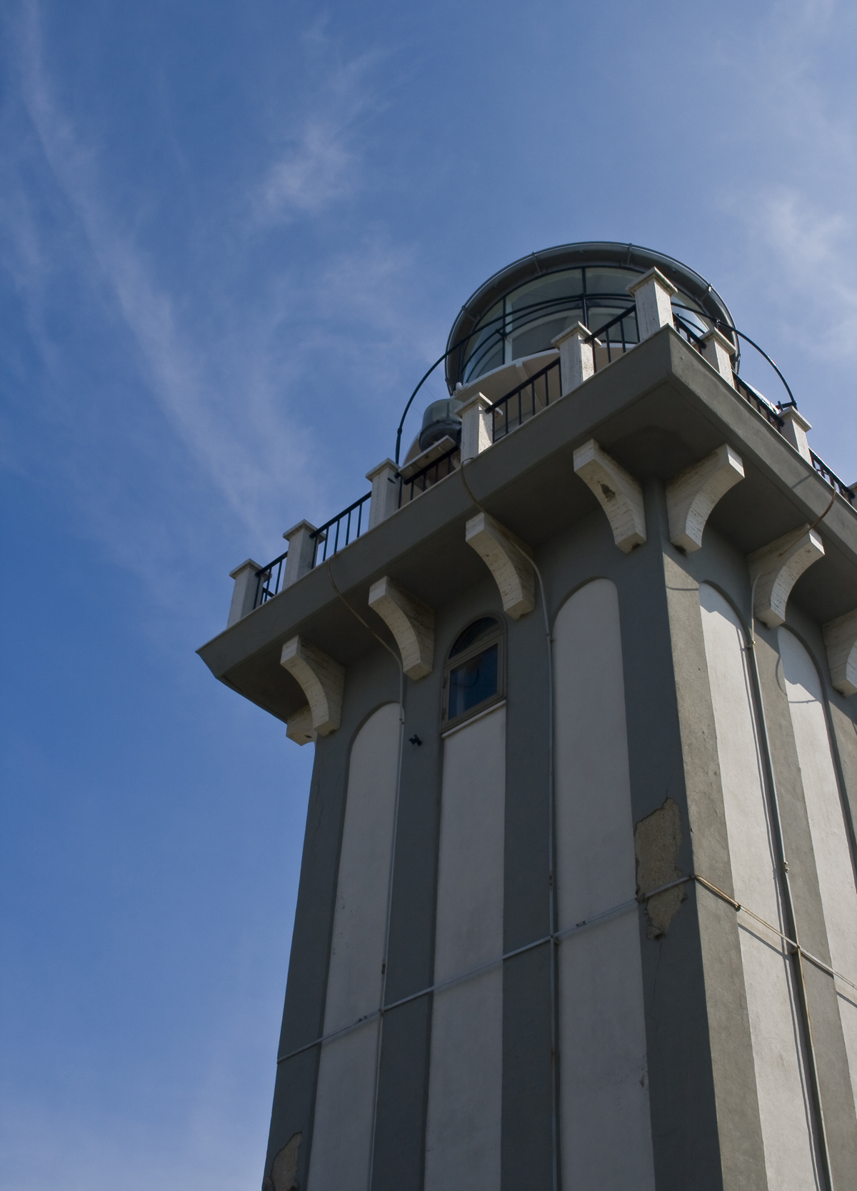 Faro nuovo al Parco del Cardeto in Ancona, Italy.